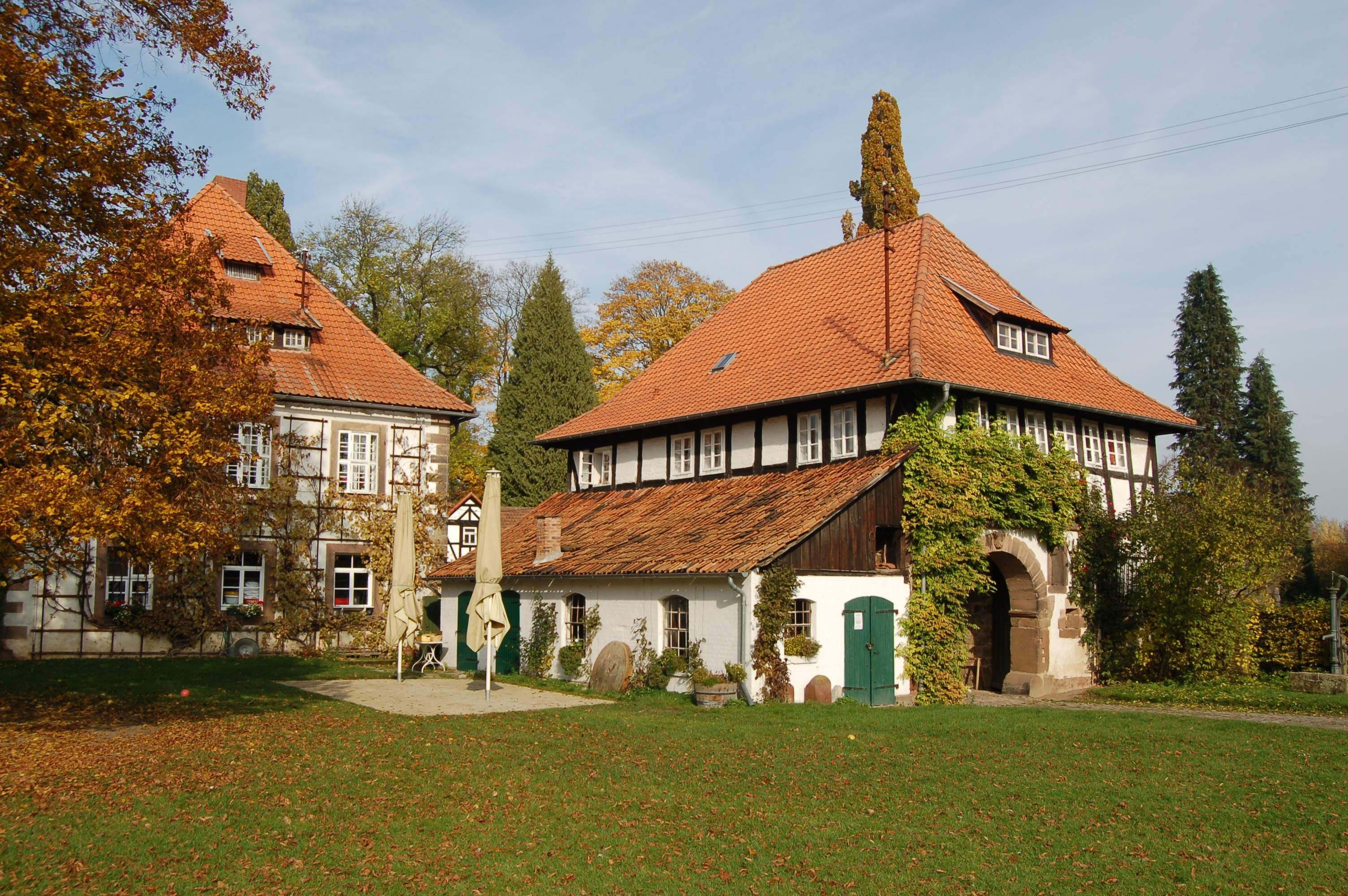 Besenhausen, Blick vom Gutshof auf Herrenhaus und Torhaus